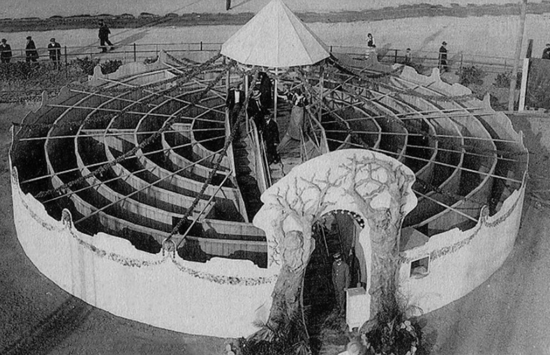 Laberinto, Saturno Park, Barcelona.